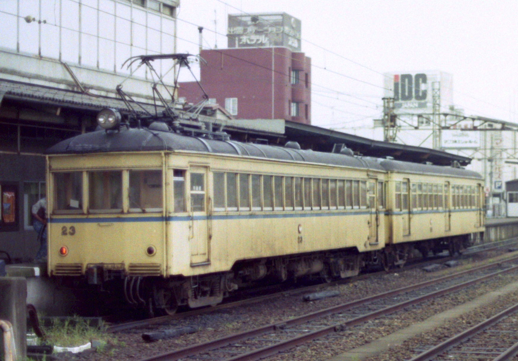 一畑電鉄デハ23 1996-08-13